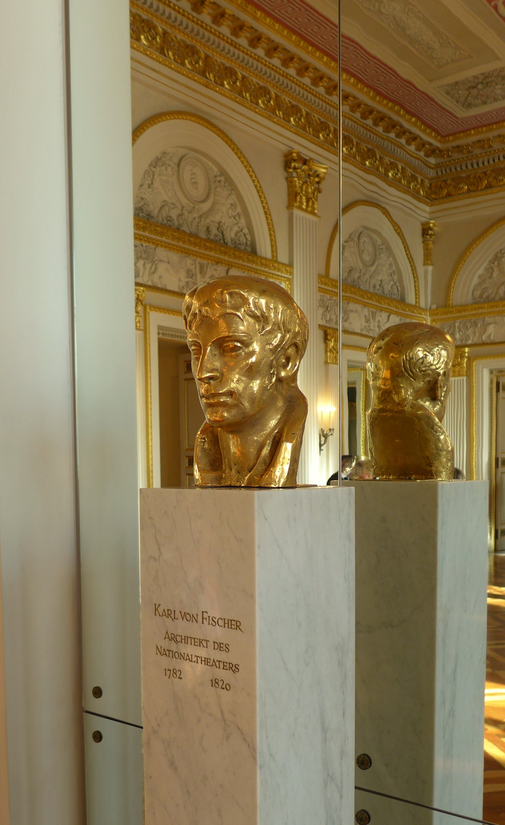 Nationaltheater München, Büste Karl von Fischers im Foyer